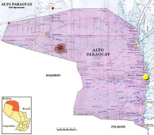 Mapa de Alto Paraguay